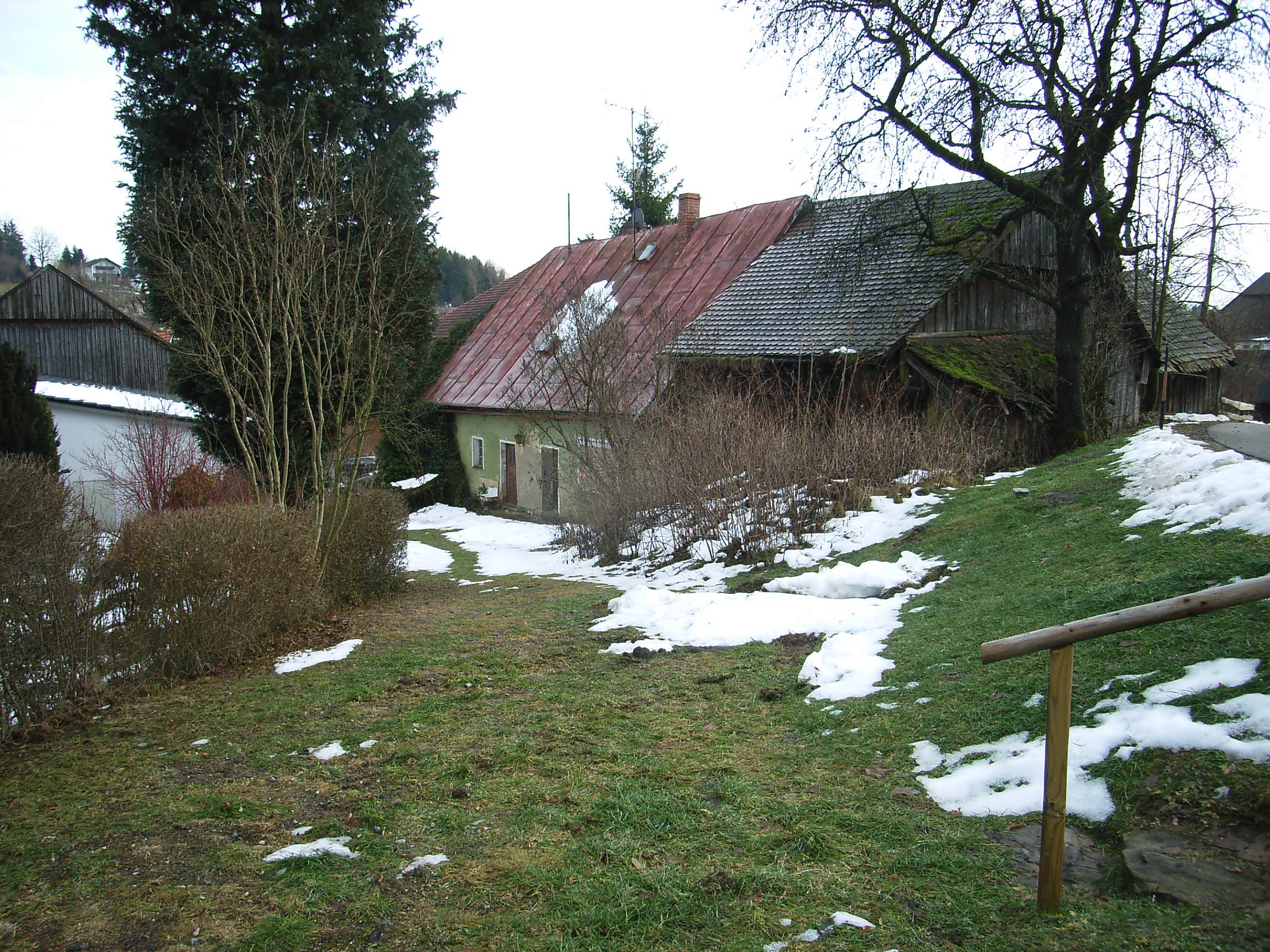 Schönau Wohnhaus (2012)